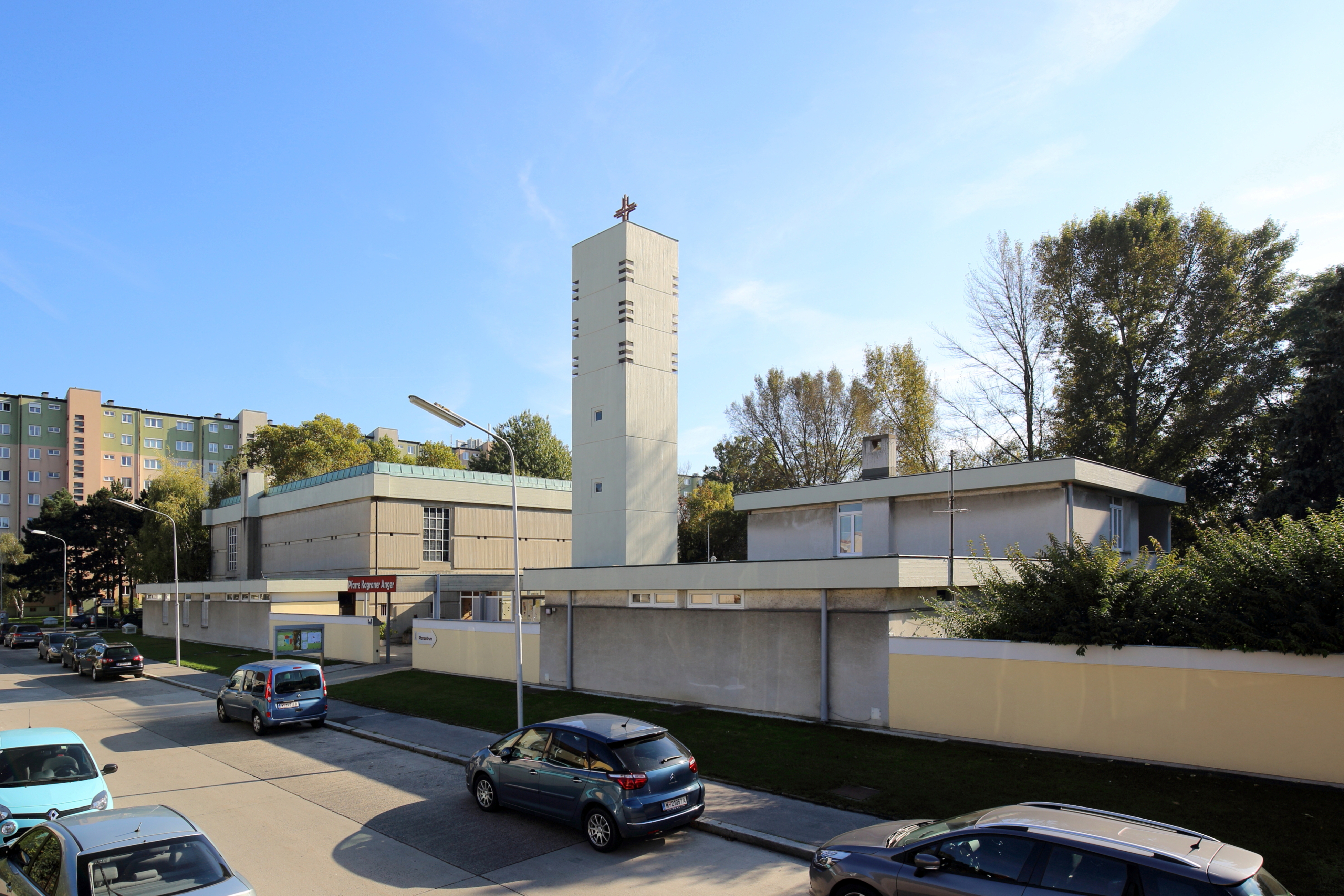 Pfarrkirche Kagraner Anger in Wien-Donaustadt.